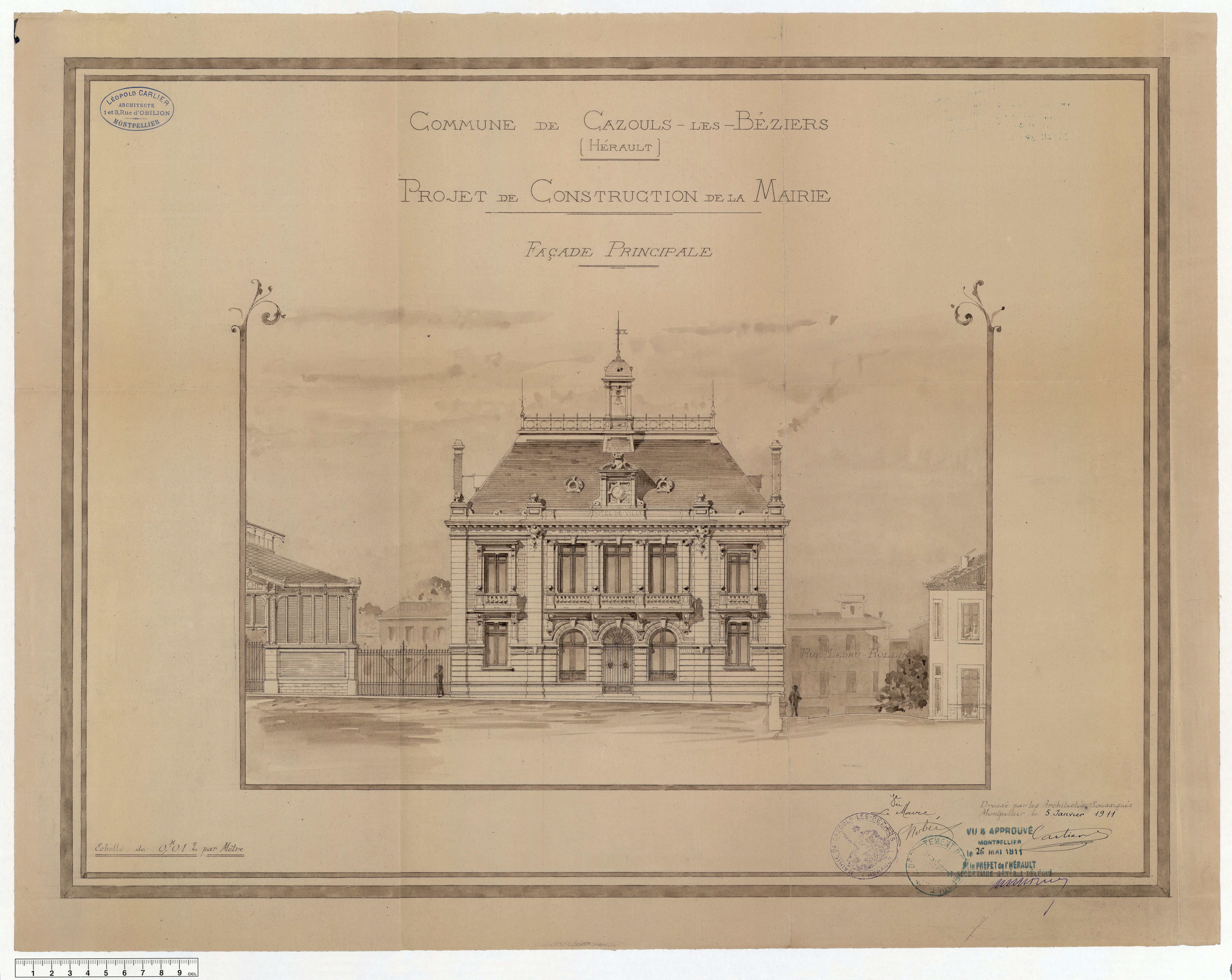 Façade de la mairie de Cazouls-lès-Béziers : plan d'un projet de construction